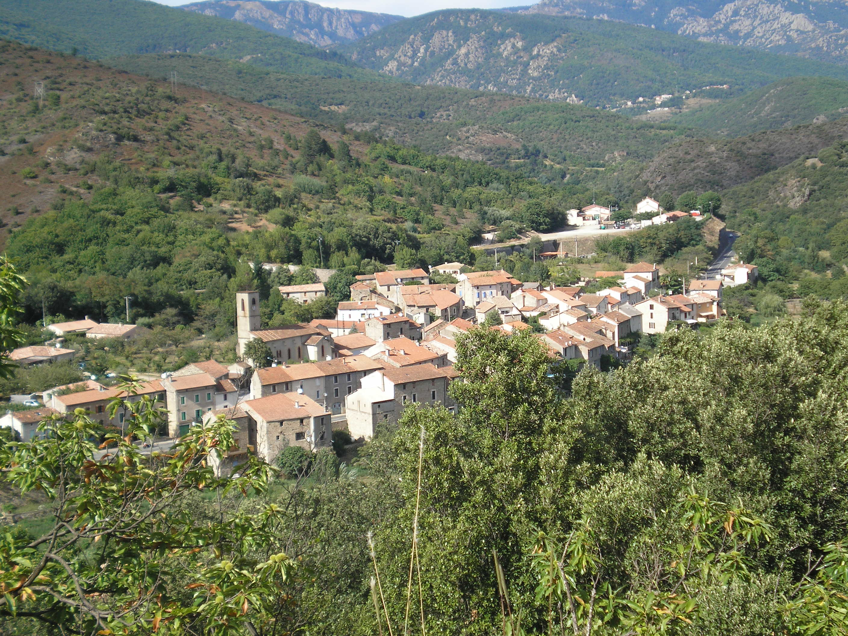 Saint-Étienne-d'Albagnan (Hérault) - vue générale.